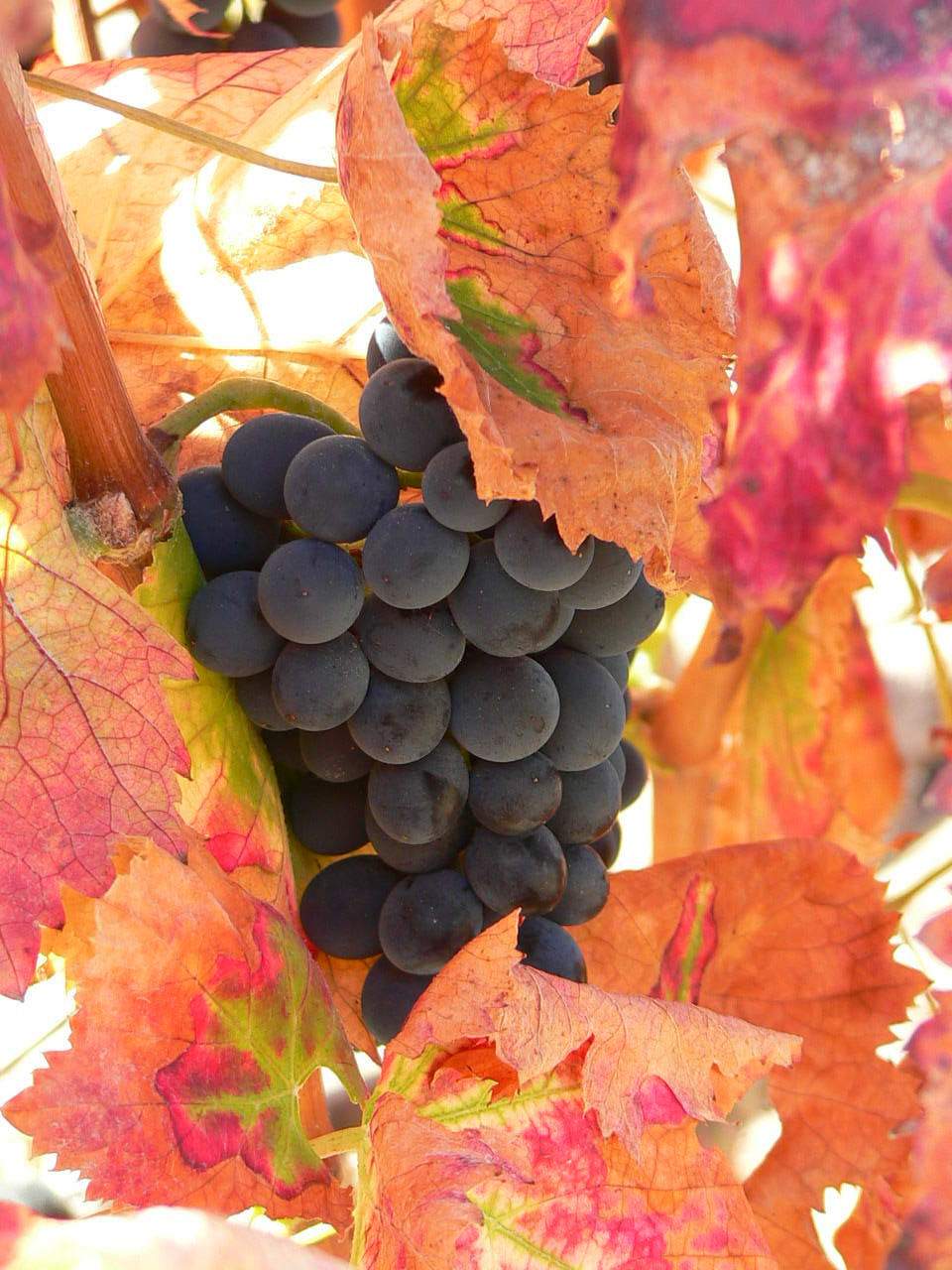 Tintilla grapes.